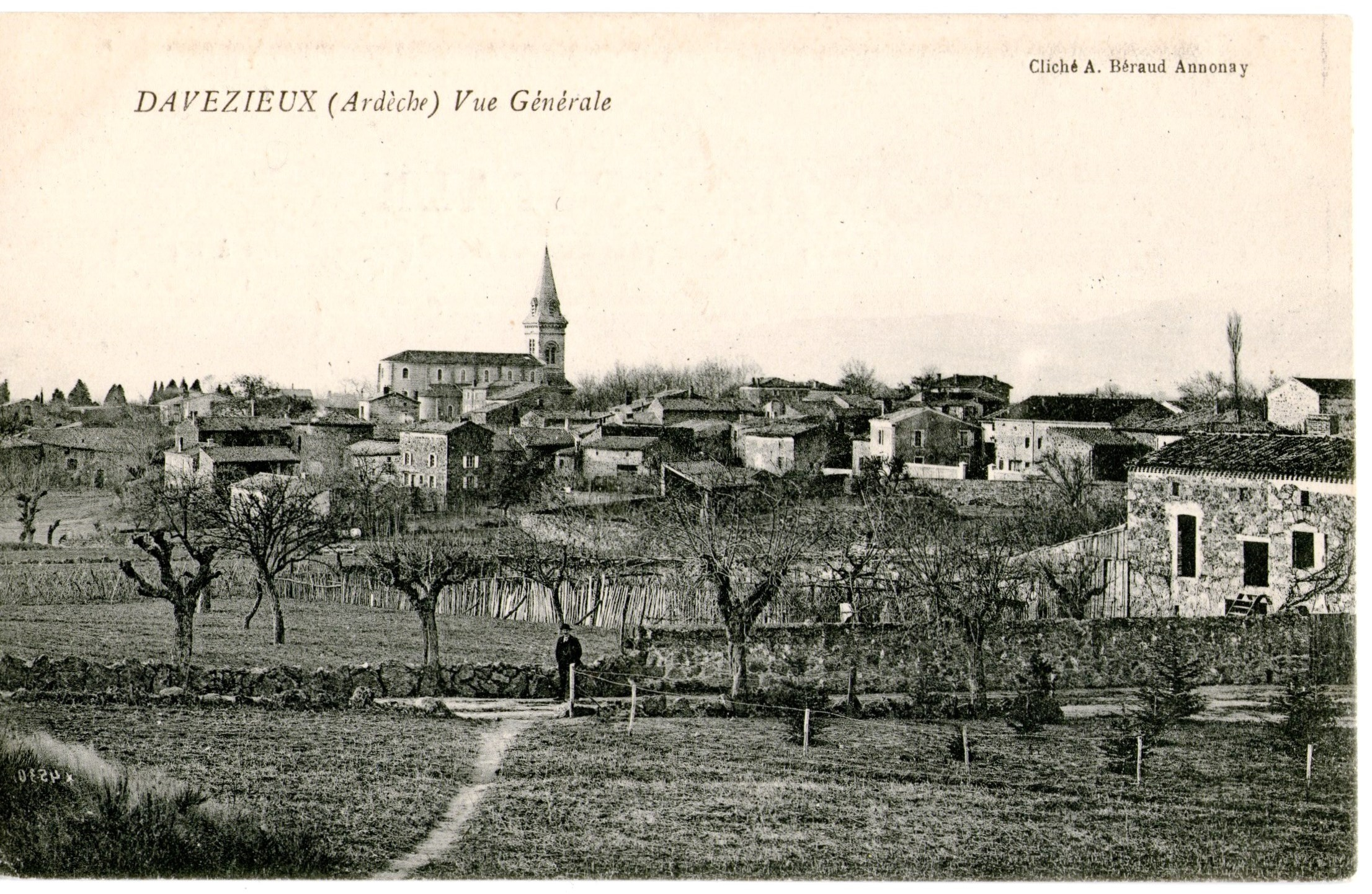 Davézieux vue générale